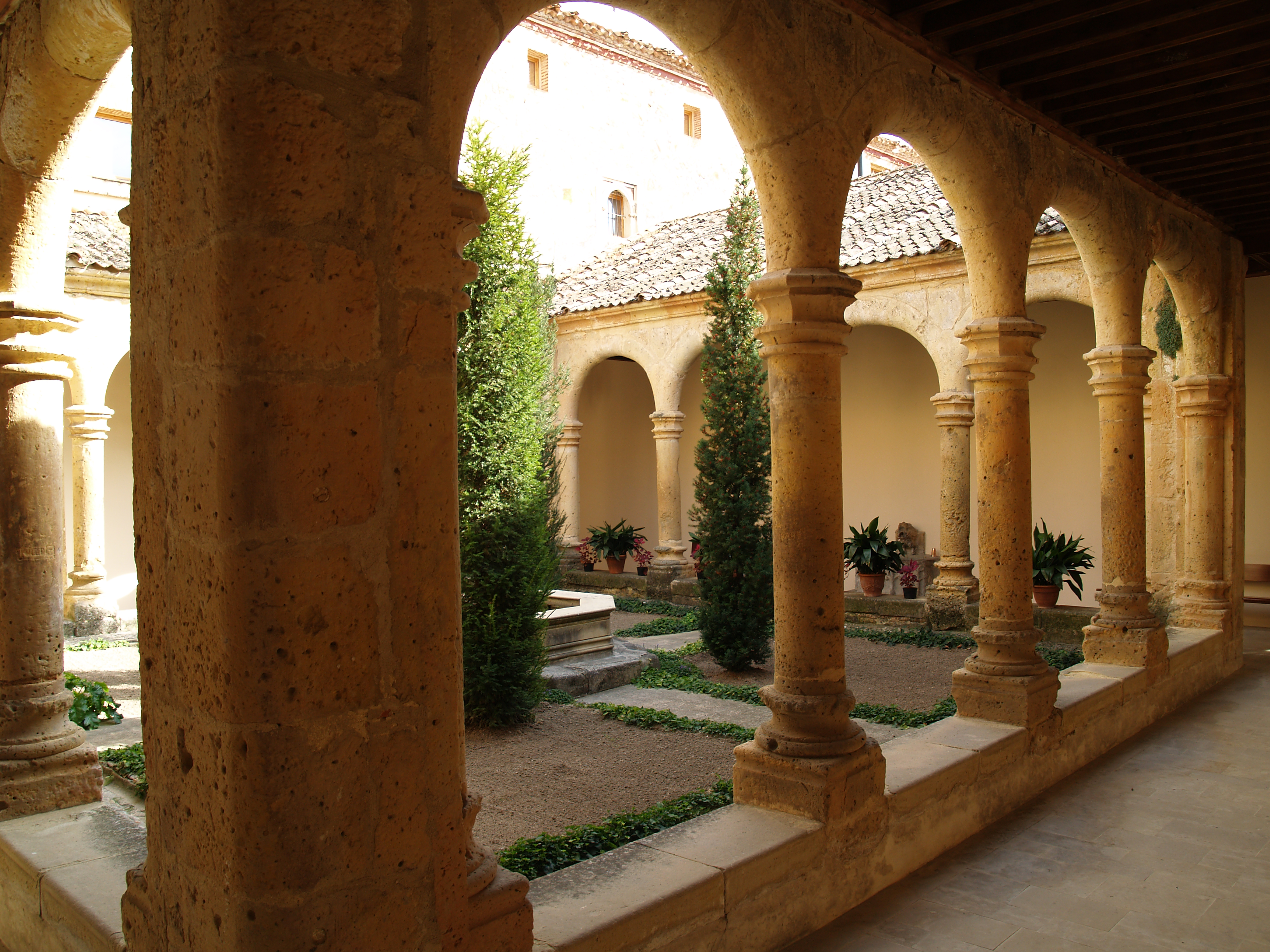 Monasterio del Parral (Segovia). Claustro pequeño. Santa Maria del Parral LocationSegovia, SpainCoordinates40° 57′ 21.7″ N, 4° 07′ 35.7″ W Established1447Authority control : Q1997245 VIAF: 236123145 BIC: RI-51-0000129 GND: 4645668-5 BNE: XX104503 JCyL: 11914 institution QS:P195,Q1997245